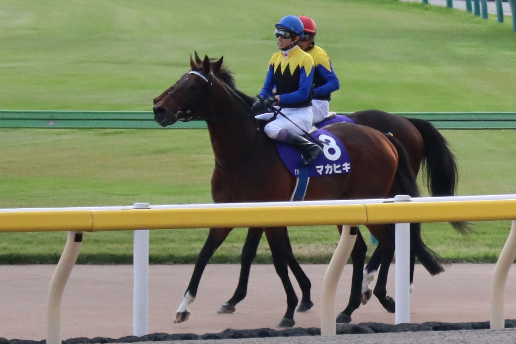 マカヒキ(第160回天皇賞出走時)